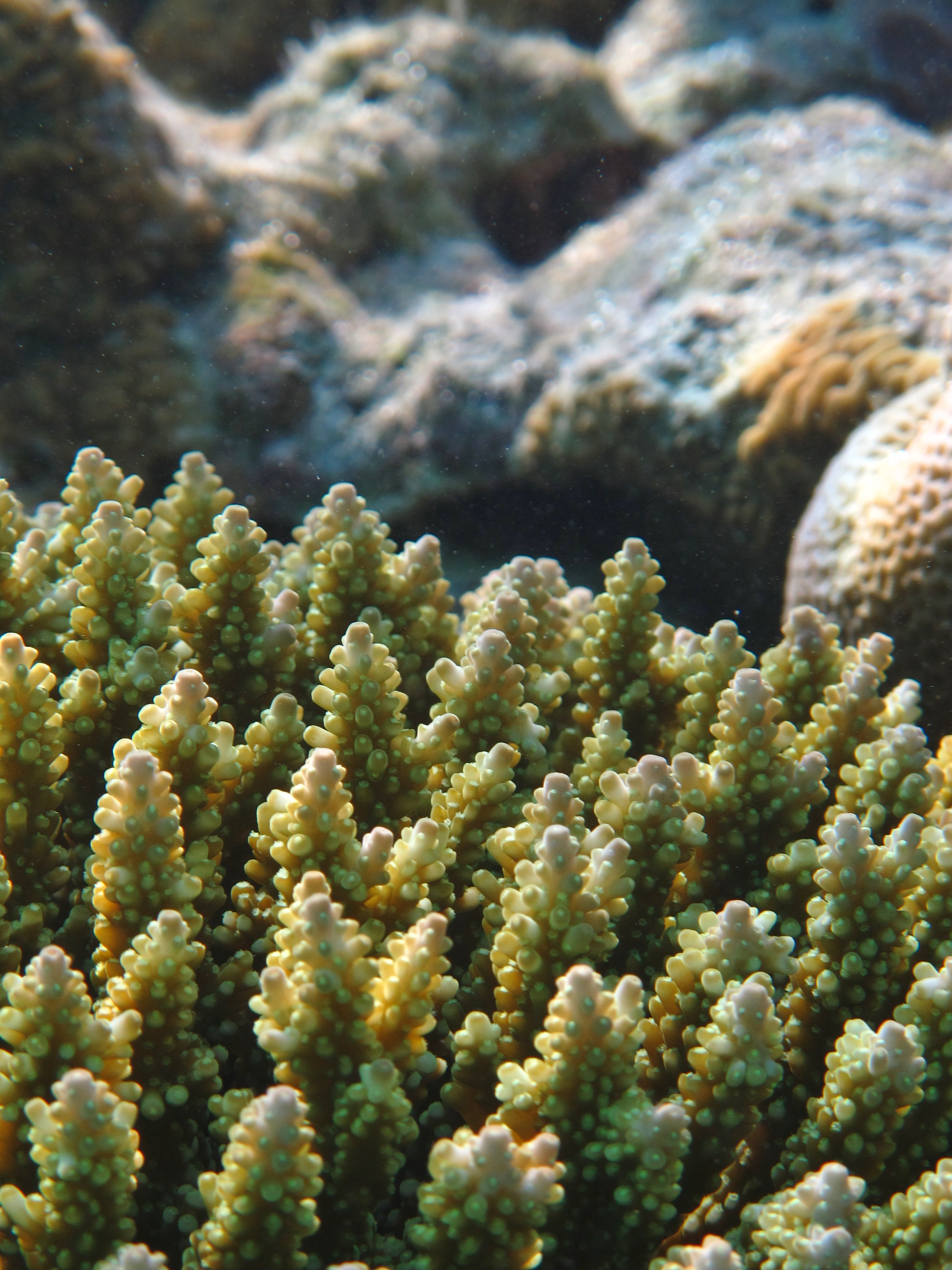 Une colonie de corail Acropora nasuta aux Maldives (atoll de Baa).